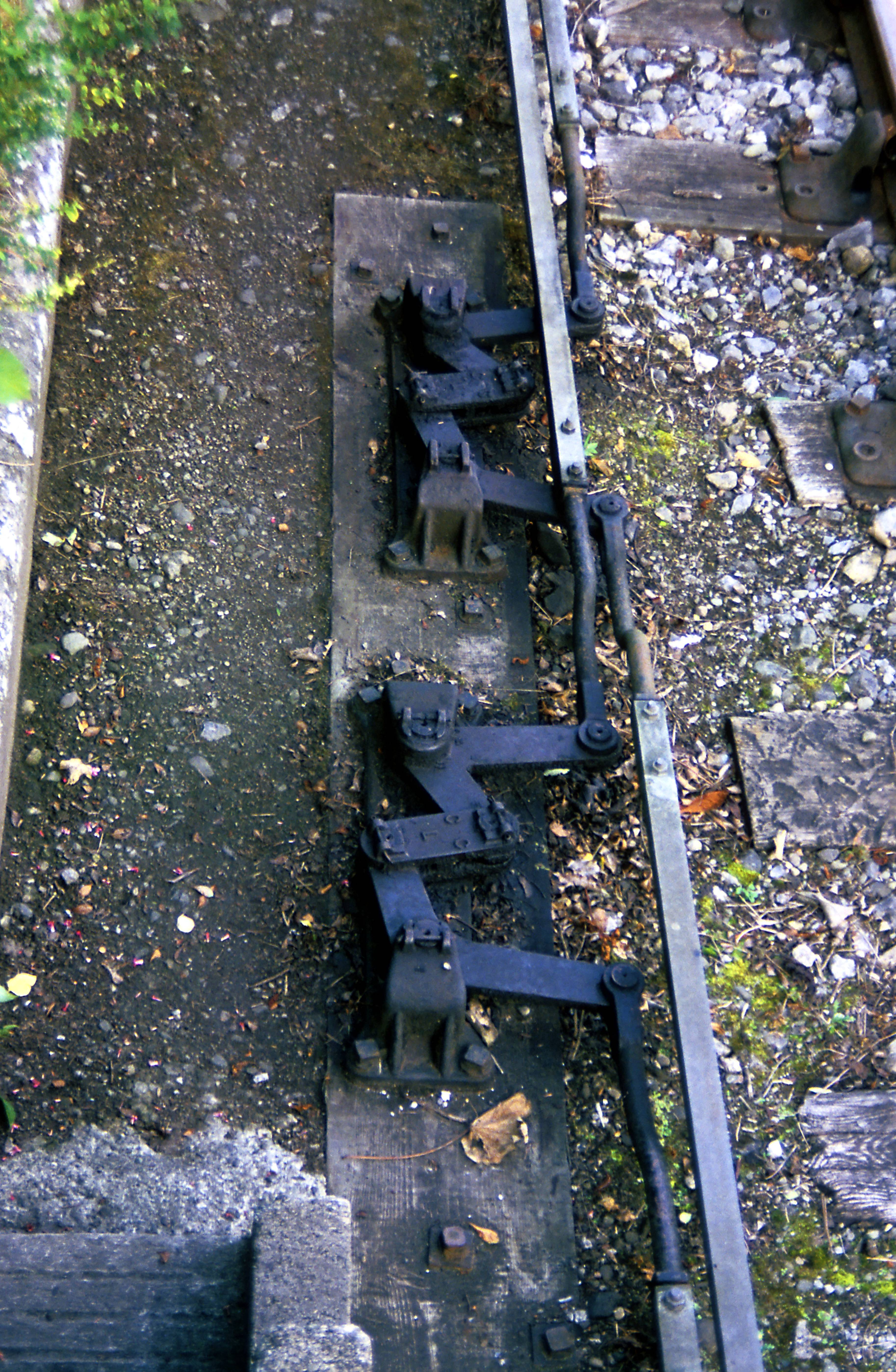 Diese Ausgleichshebel kehren die Bewegungsrichtung der Gestängeleitungen um, damit wird die temperaturbedingte Längenänderung ausgeglichen. Für eine möglichst vollkommene Wirkung werden sie so nah an der Mitte der Leitung wie möglich angeordnet